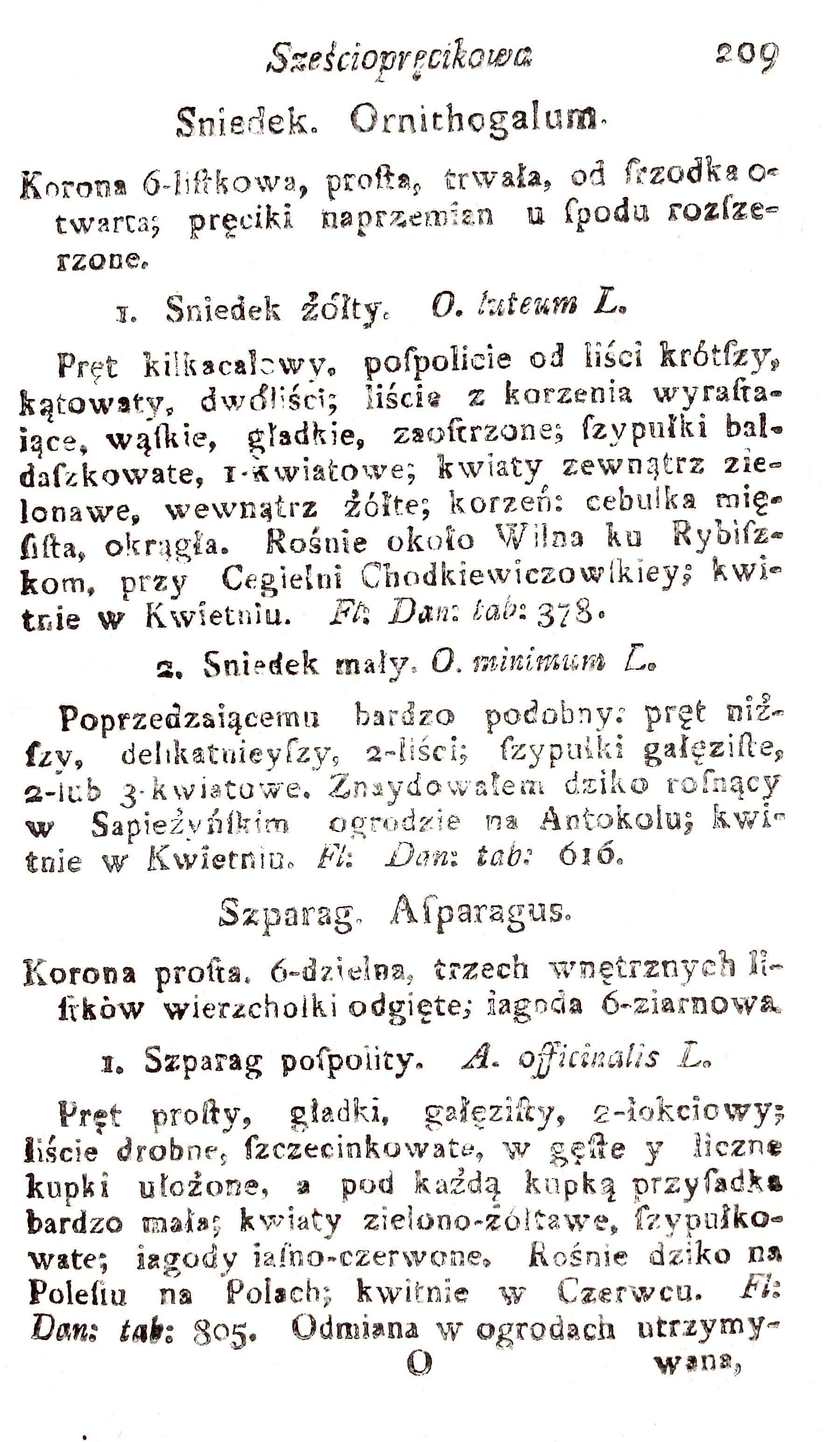 Jedna ze stron Opisania roślin Stanisława Bonifacego Jundziłła